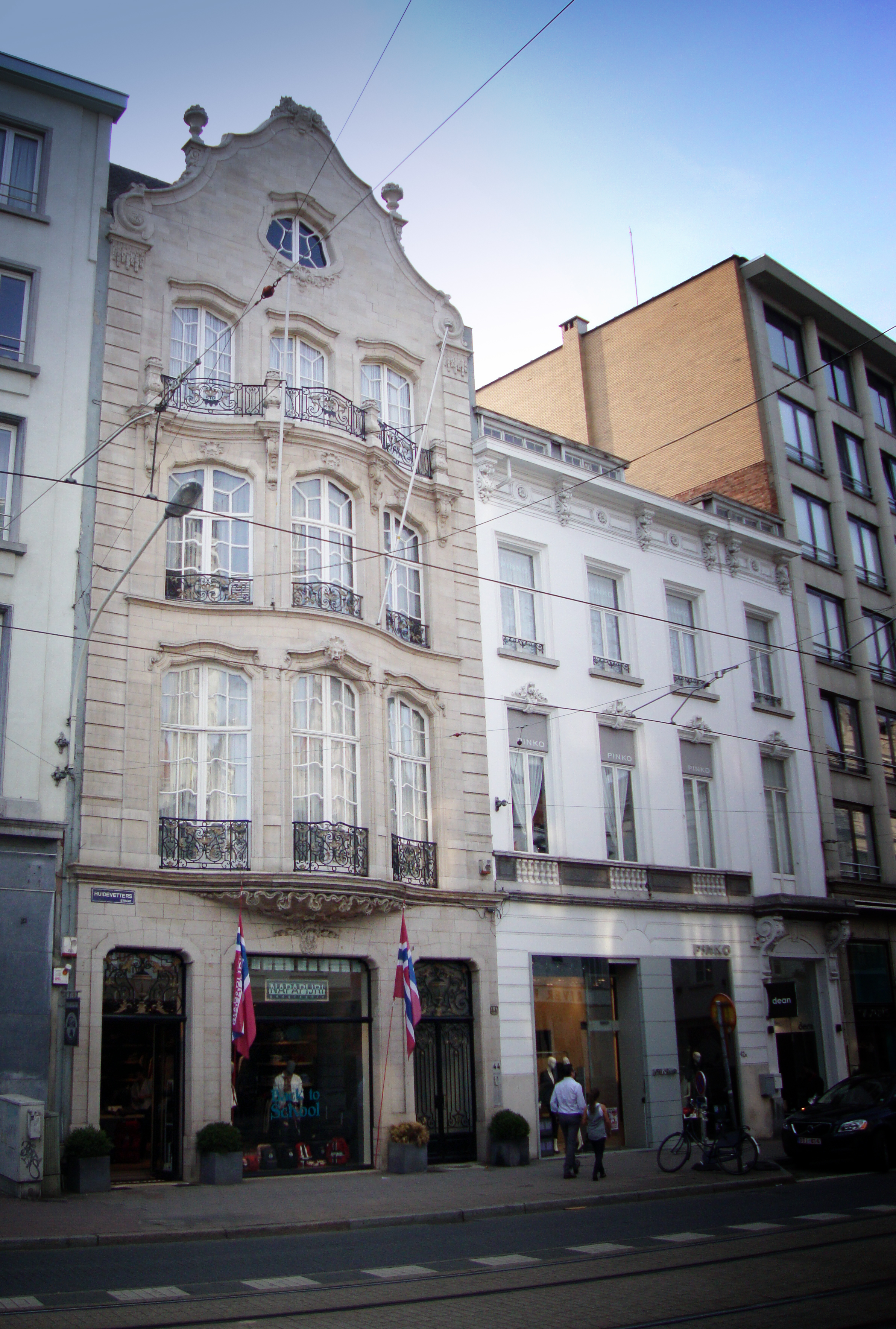 Huis Onze Lieve Vrouw van Napels